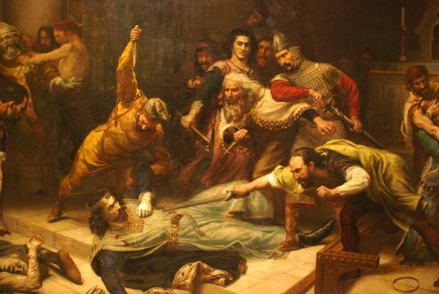 The murder of Raymond Trencavel, Viscount of Béziers, on 15th October 1167